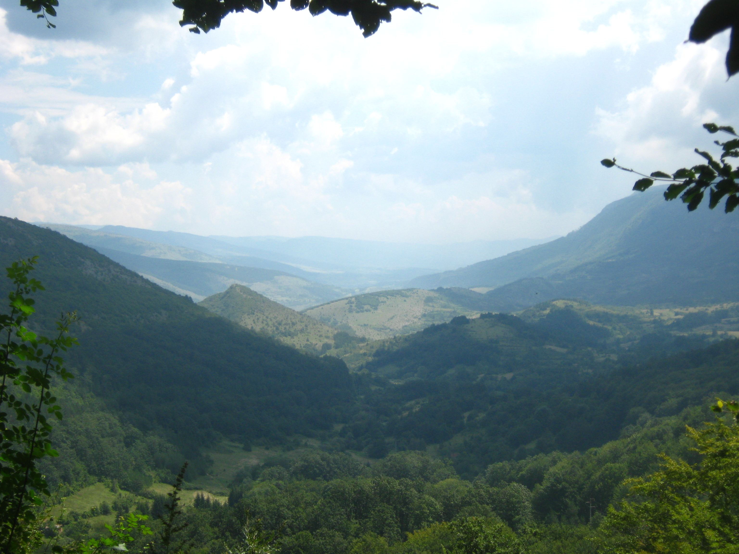 Ово је фотографија заштићеног природног добра у Србији под шифром: ПП16This is a a photo of a natural area in Serbia with ID: ПП16